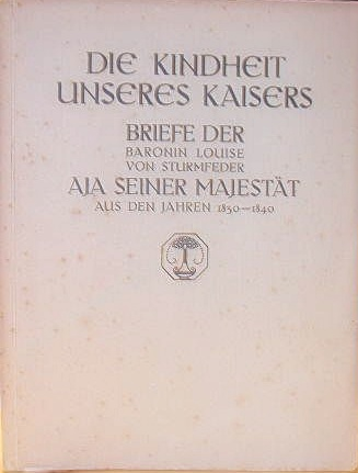 Louise von Sturmfeder, publizierte Briefesammlung